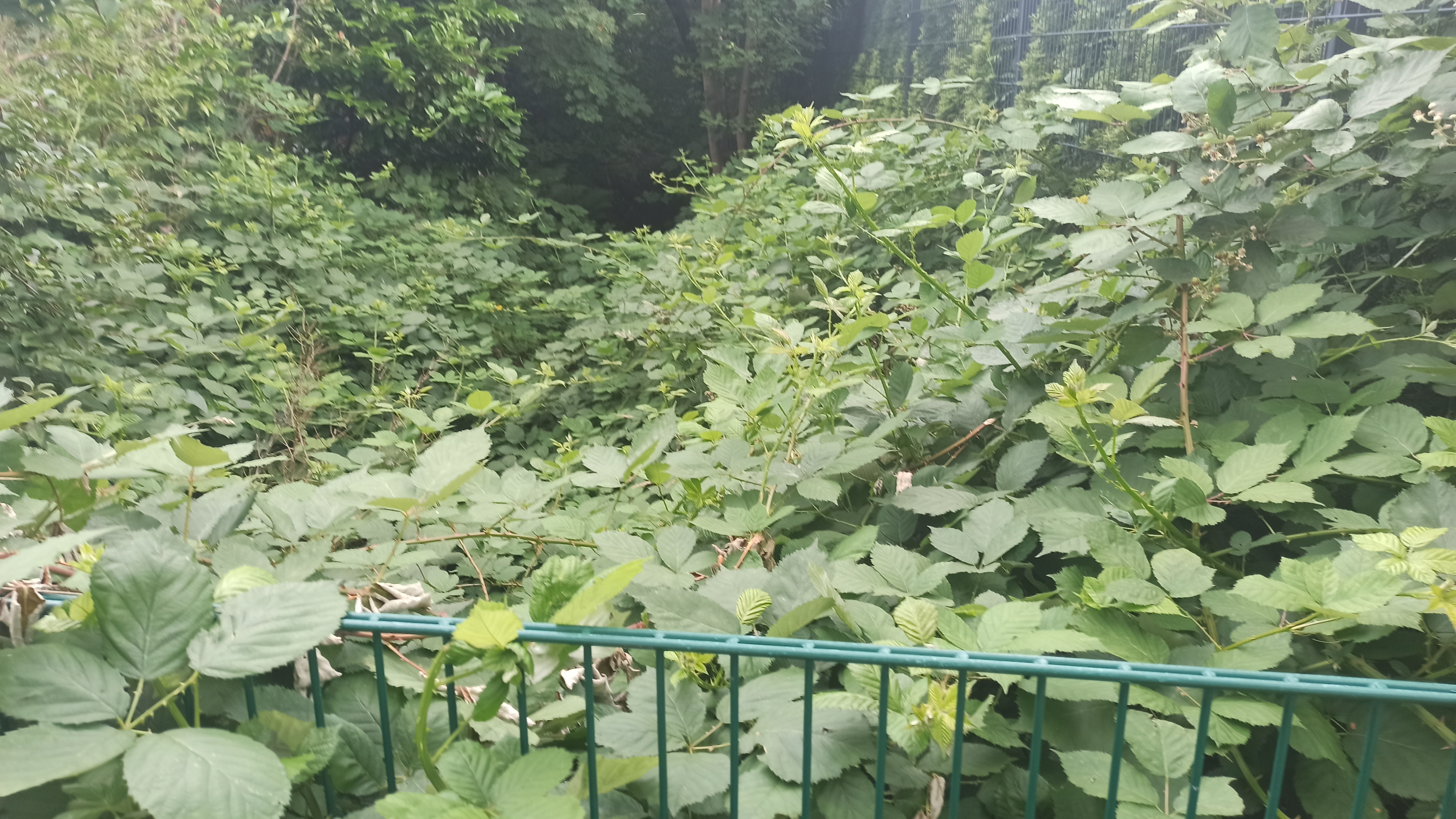 Quelle des (zugewachsenen) Schippelsmoorgrabens